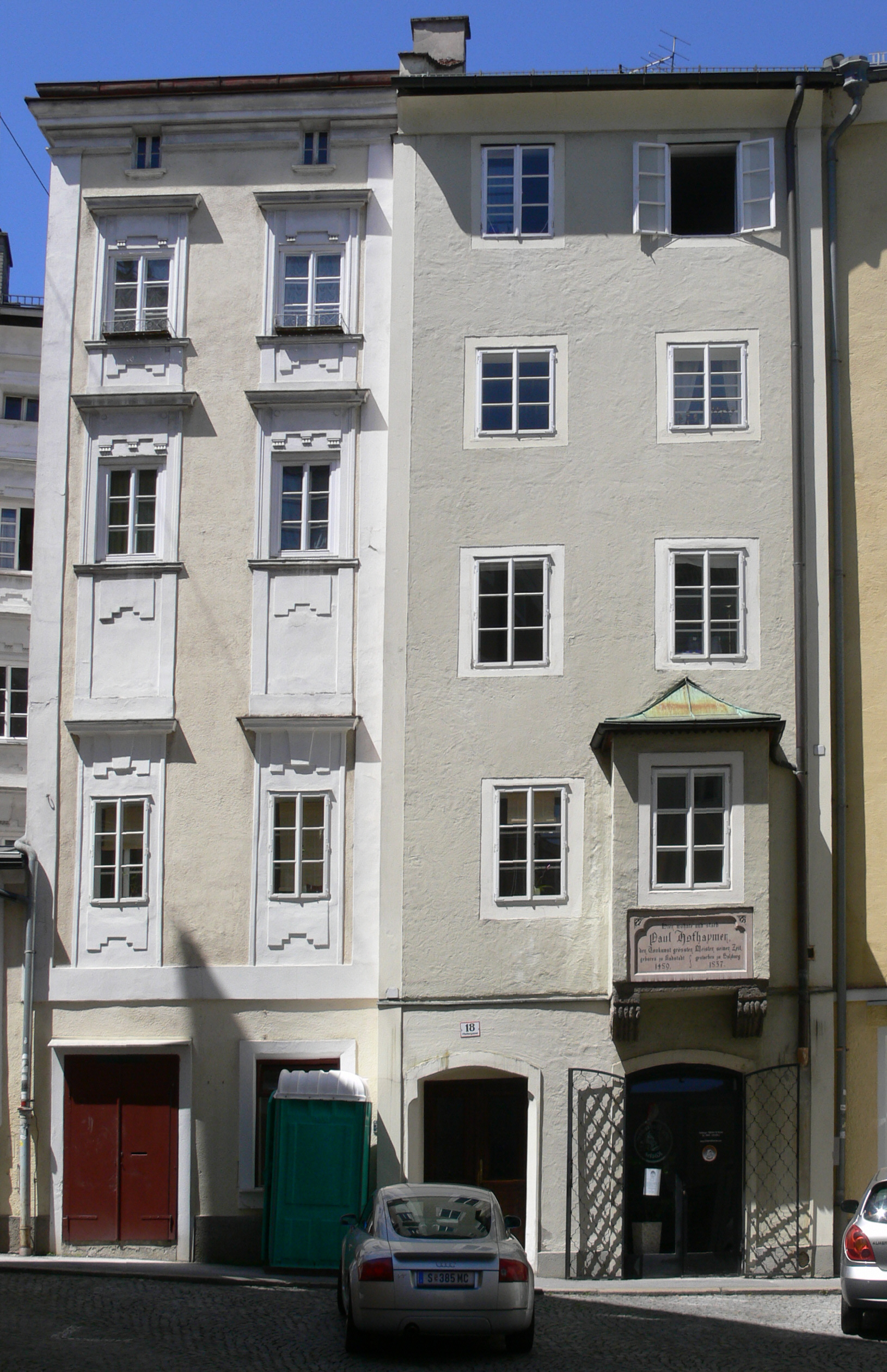 Salzburg, Pfeifergasse 18 (Wohn- und Sterbehaus des Komponisten Paul Hofhaimer)